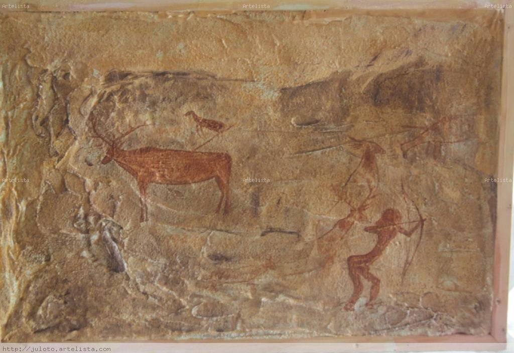 Panel naturalista levantino en Cañaica del Calar